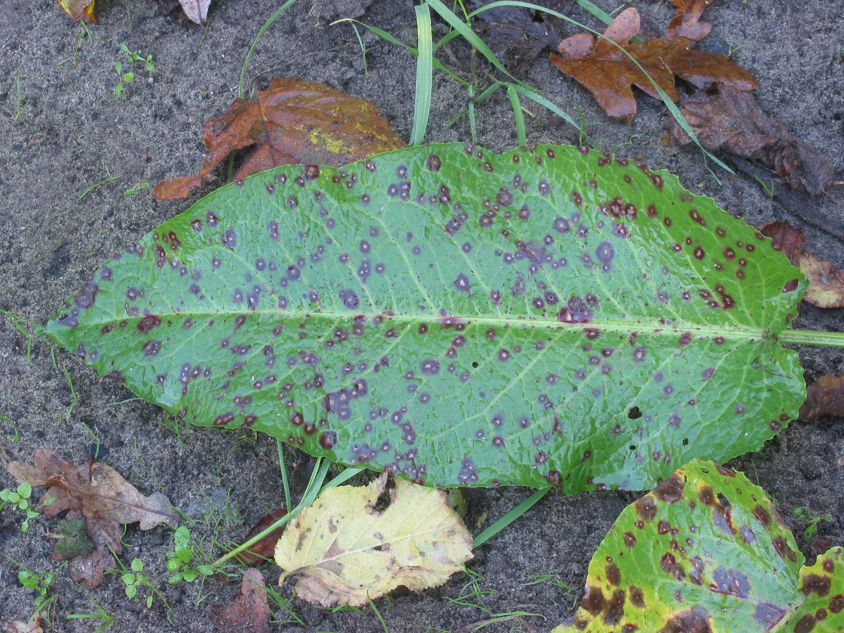 Ridderzuring bladvlekkenziekte) Rumex obtusifolius with leaf spot (Ramularia rubella